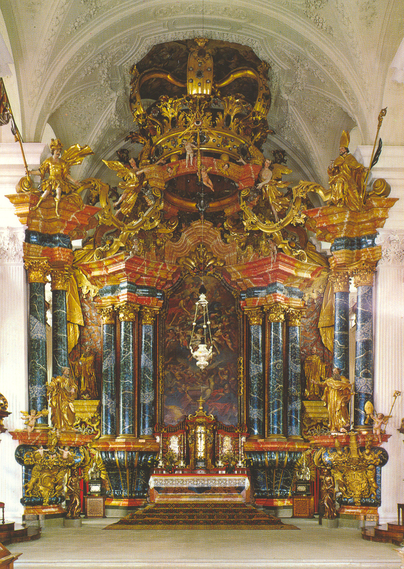 Aufnahme 22. Juni 2005, Hochalter der Klosterkirche Rheinau, Kanton Zürich, Schweiz. Fotograf Peter Berger (selbst fotografiert). Lizenzstatus "GNU-FDL"